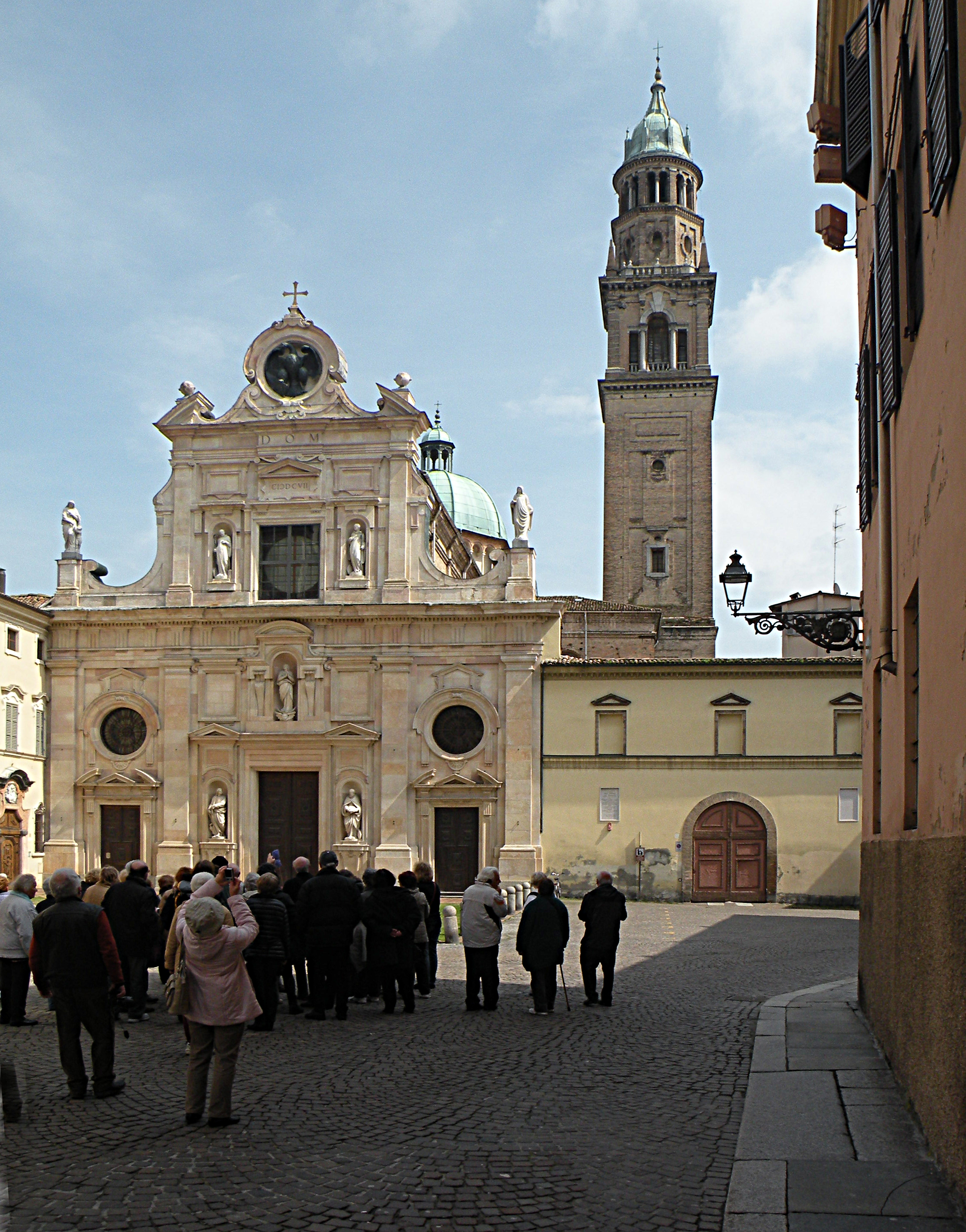 Церковь Иоанна Евангелиста в Парме